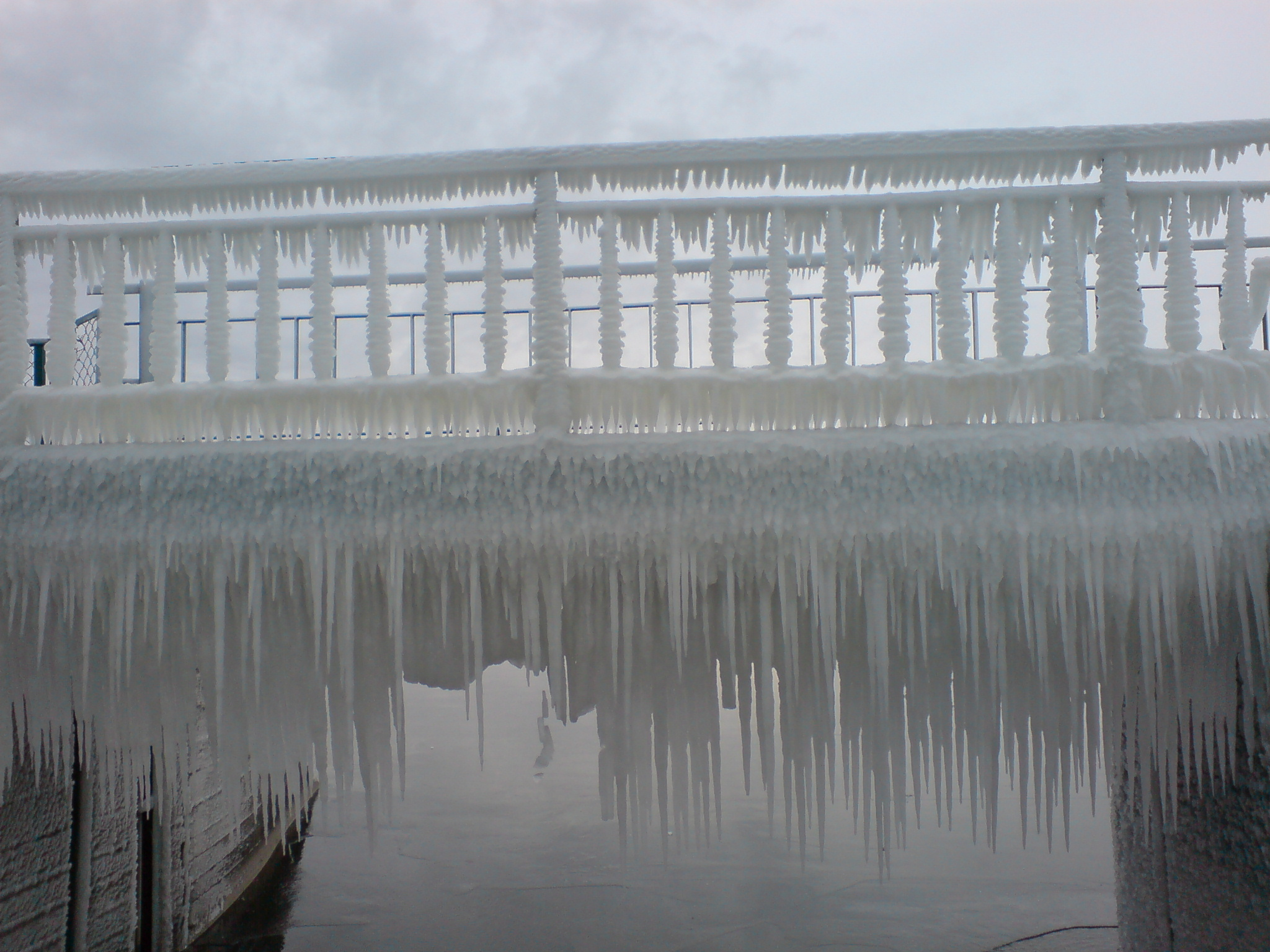 Miedzna Murowana